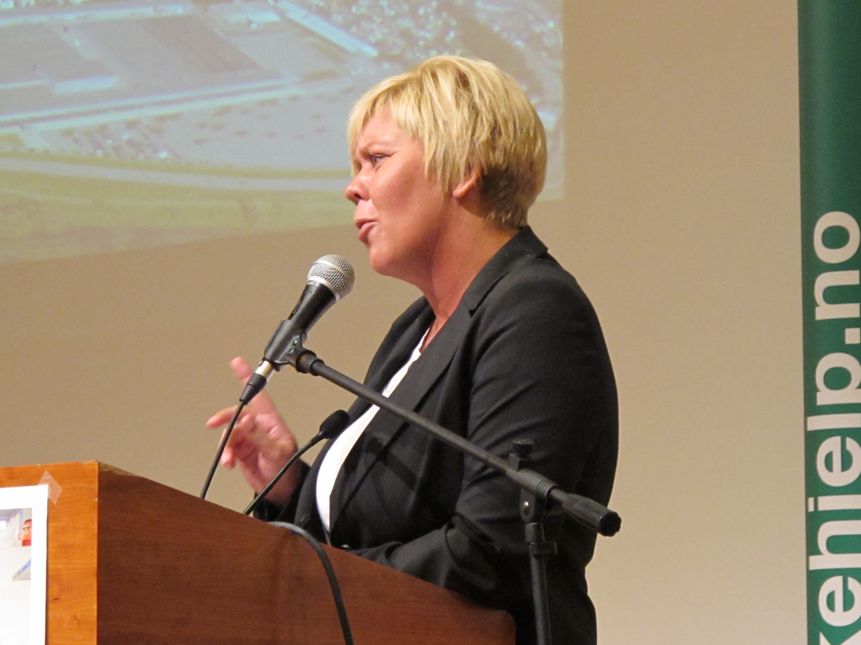 Ordfører Anita Orlund